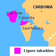 autore:Andre86 fonte:un pc descrizione: diffusione del tabarchino (lingua ligure) in Sardegna in provincia di Carbonia-Iglesias nel Sulcis licenza d'uso: pubblico dominio